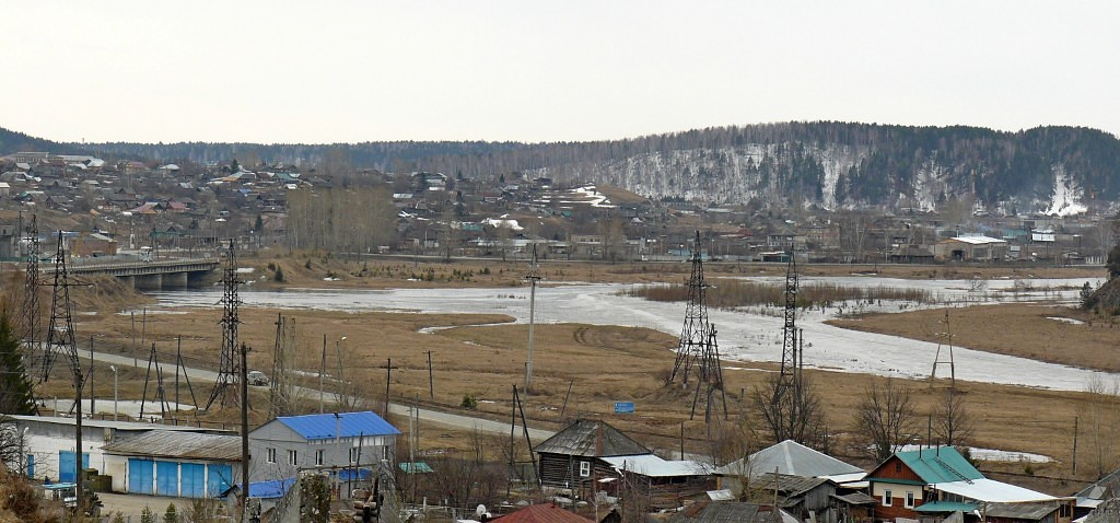 г. Нязепетровск. Устье реки Нязя (справа) в месте слияния с рекой Уфа (слева).